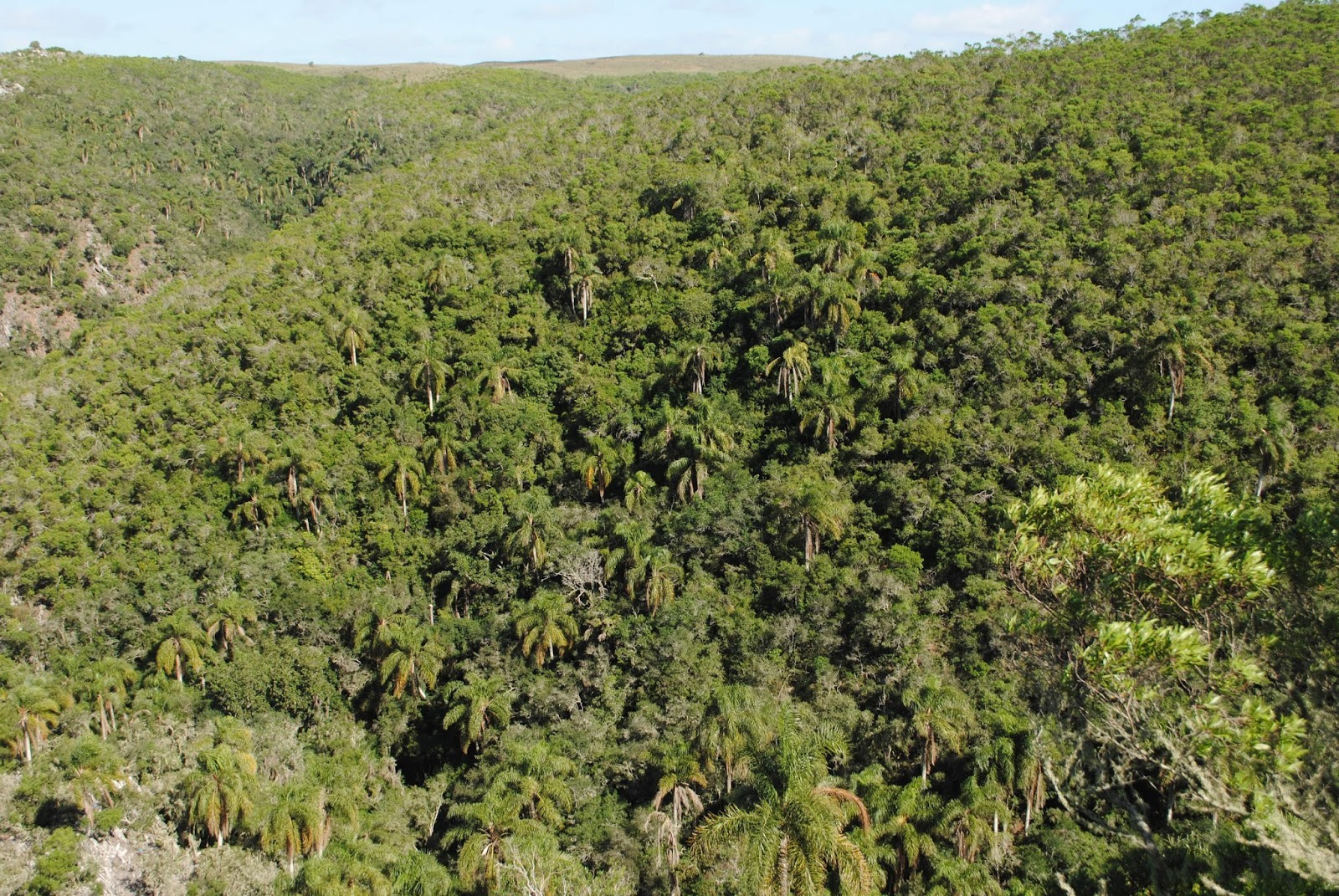 Syagrus romanzoffiana. Arecaceae. Fotos tomadas en bosque de quebrada al margen del Arroyo Yerbal Chico en la Quebrada de los Cuervos, departamento de Treinta y Tres y en ladera del Cerro Buena Vista en el departamento de Rivera, Uruguay.